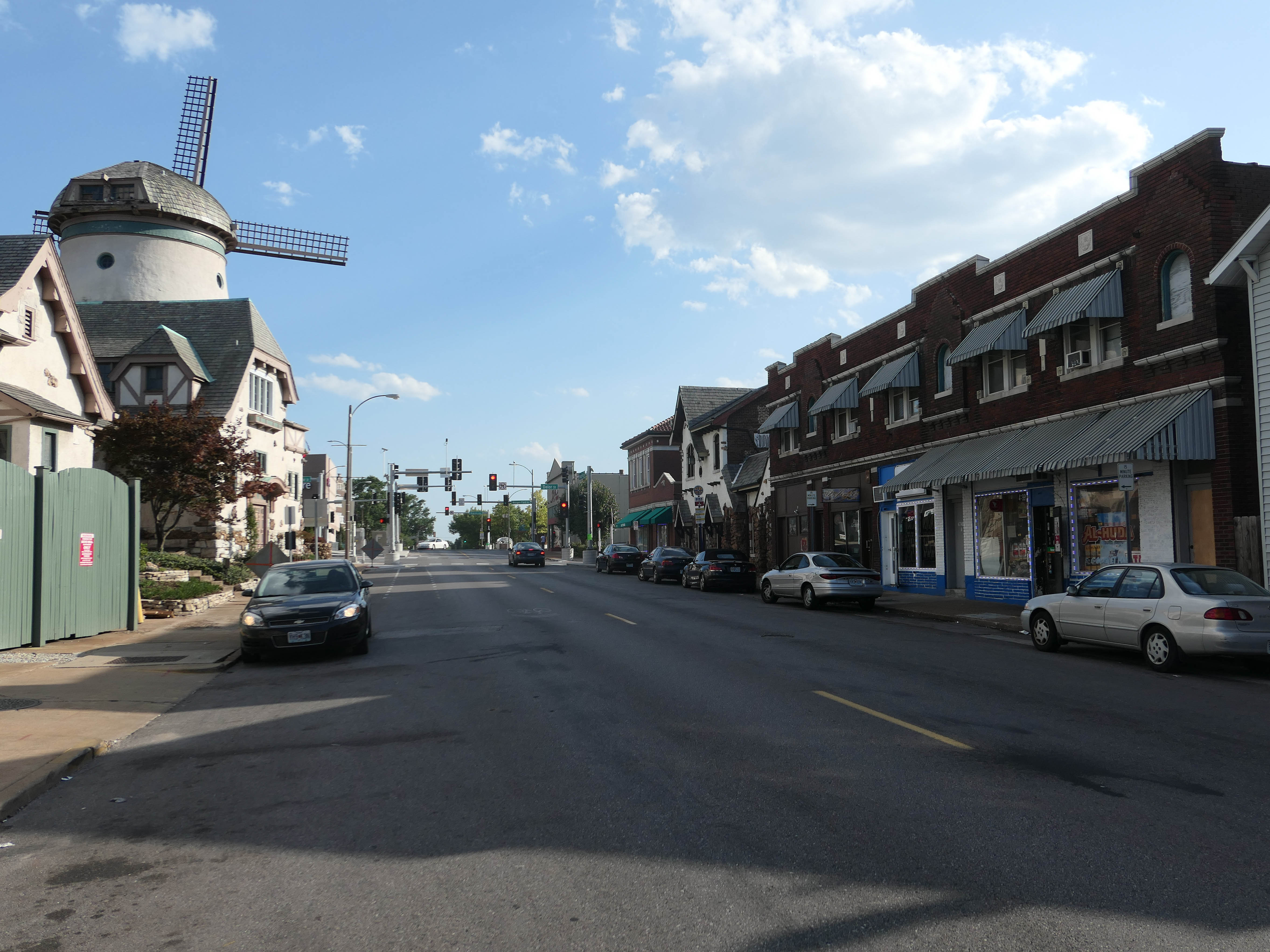 Morganford